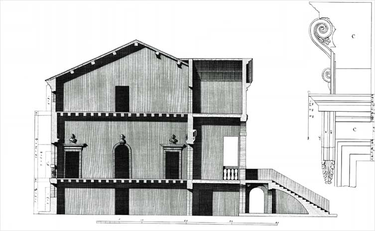 Villa Forni Cerato a Montecchio Precalcino (Vicenza). Disegno da Ottavio Bertotti Scamozzi, 1778